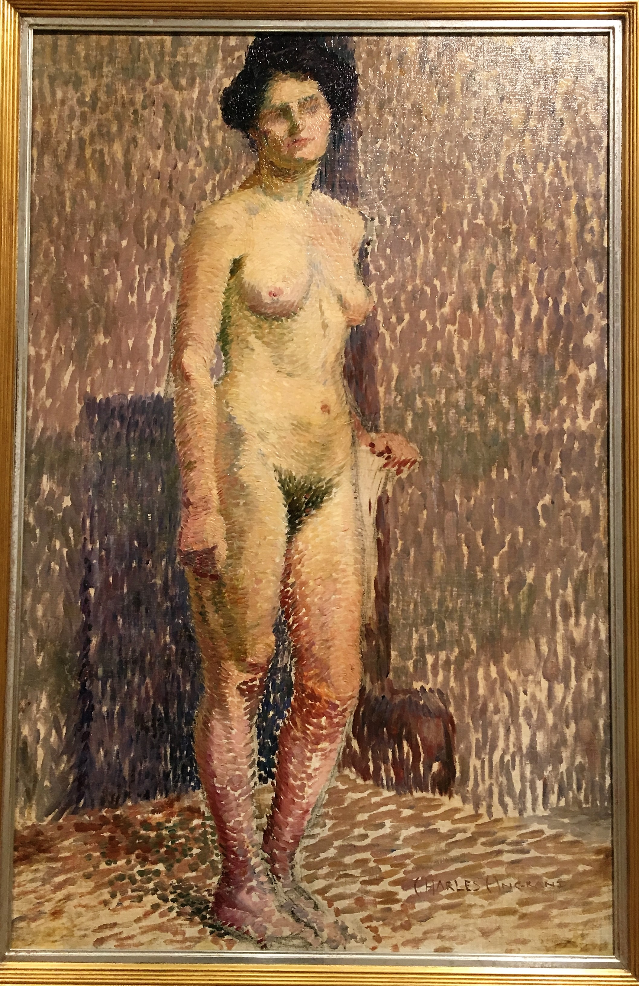 Huile sur toile de Charles Angrand exposée au musée des beaux arts de Caen (donation Larcier 1995)